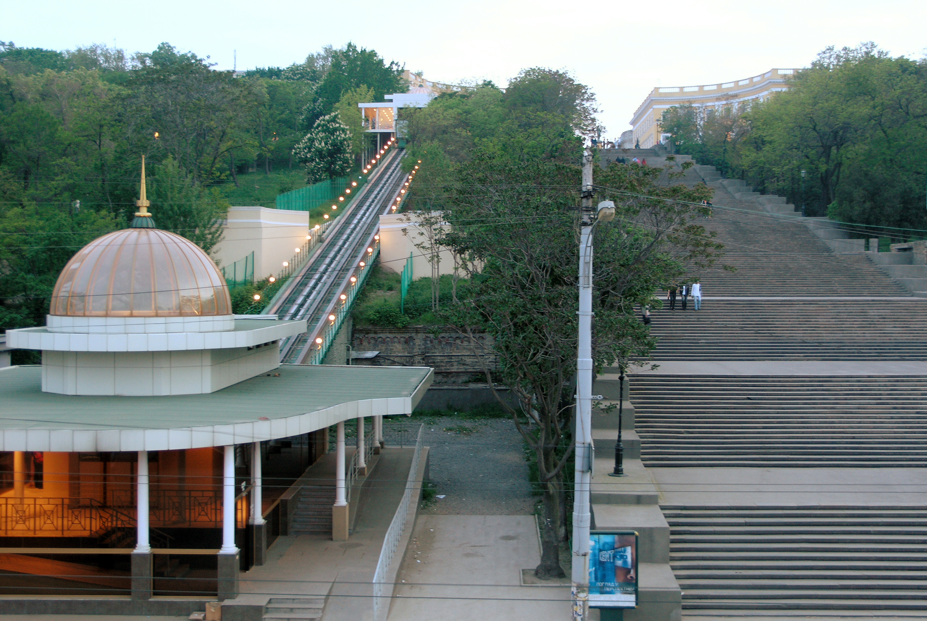 Україна, Одеса - Приморські (Гігантські, буларні, Потьомкінські) сходи